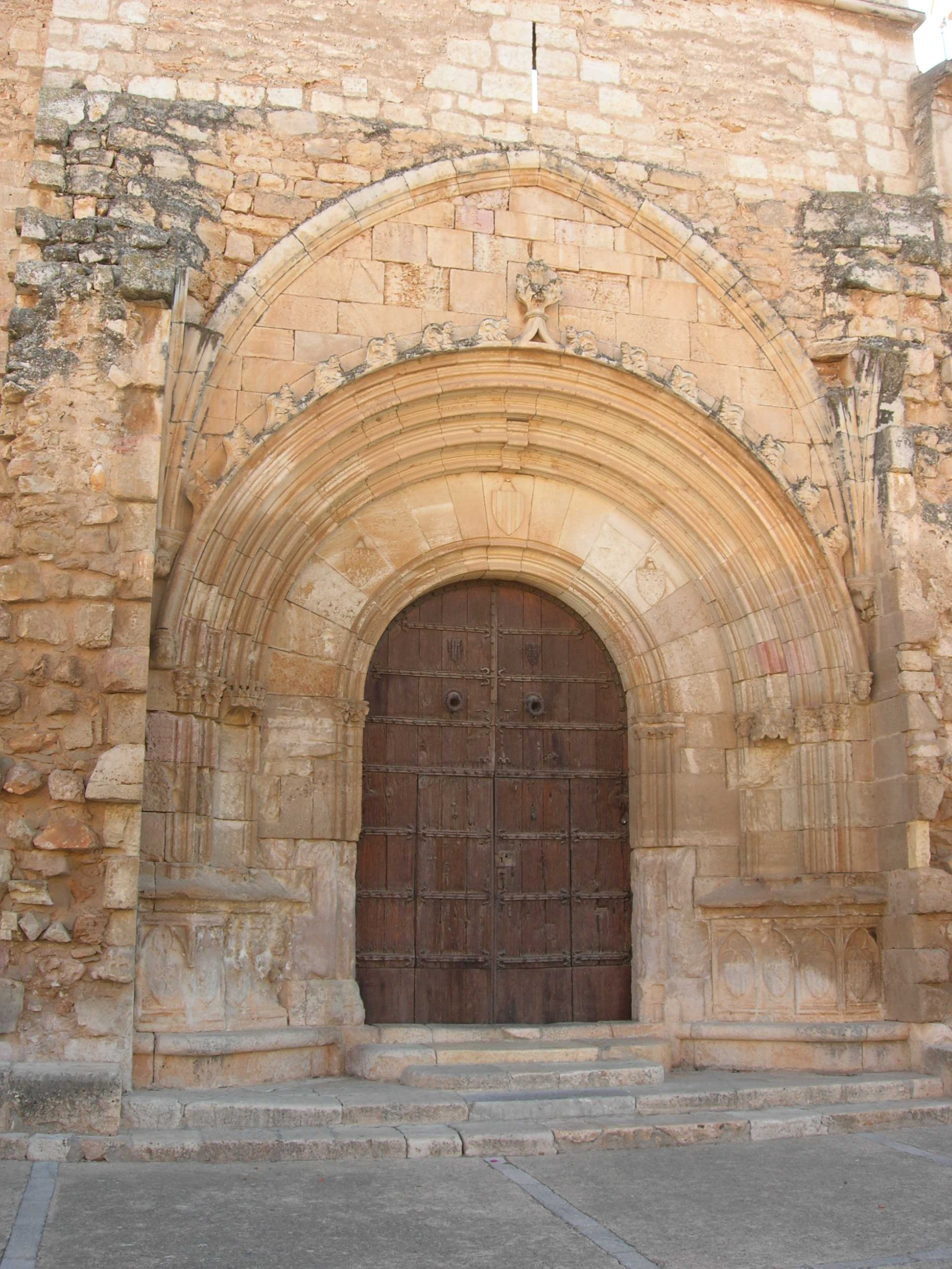 Monastère de Santes Creus, Catalogne, Espagne.